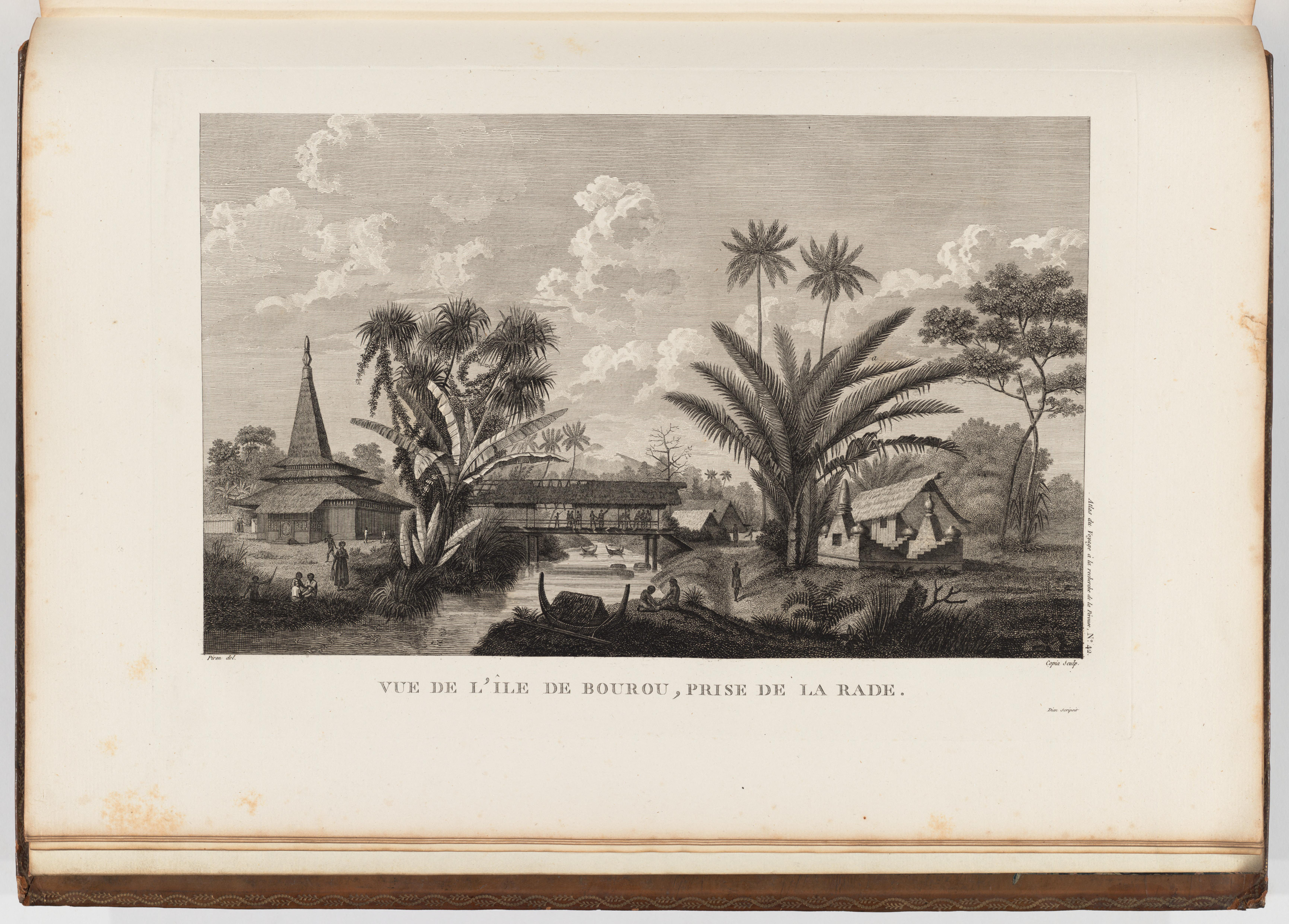 Voyage de La Pérouse autour du monde /publié conformément au décret du 22 avril 1791, et rédigé par L.A. Milet-Mureau.